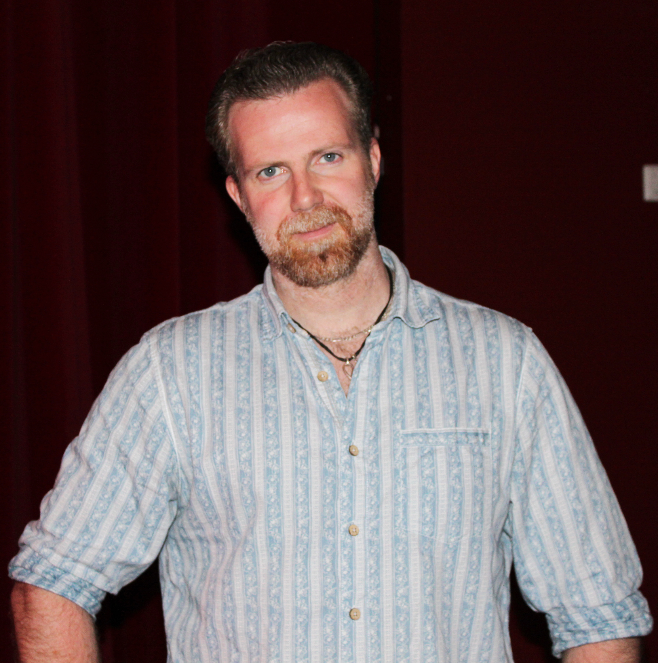 Forfatter Asbjørn Rydland. Bildet tatt under NM i litteraturformidling 2012, der Rydlands bok "Drakeguten" var obligatorisk tekst for alle deltakerne.